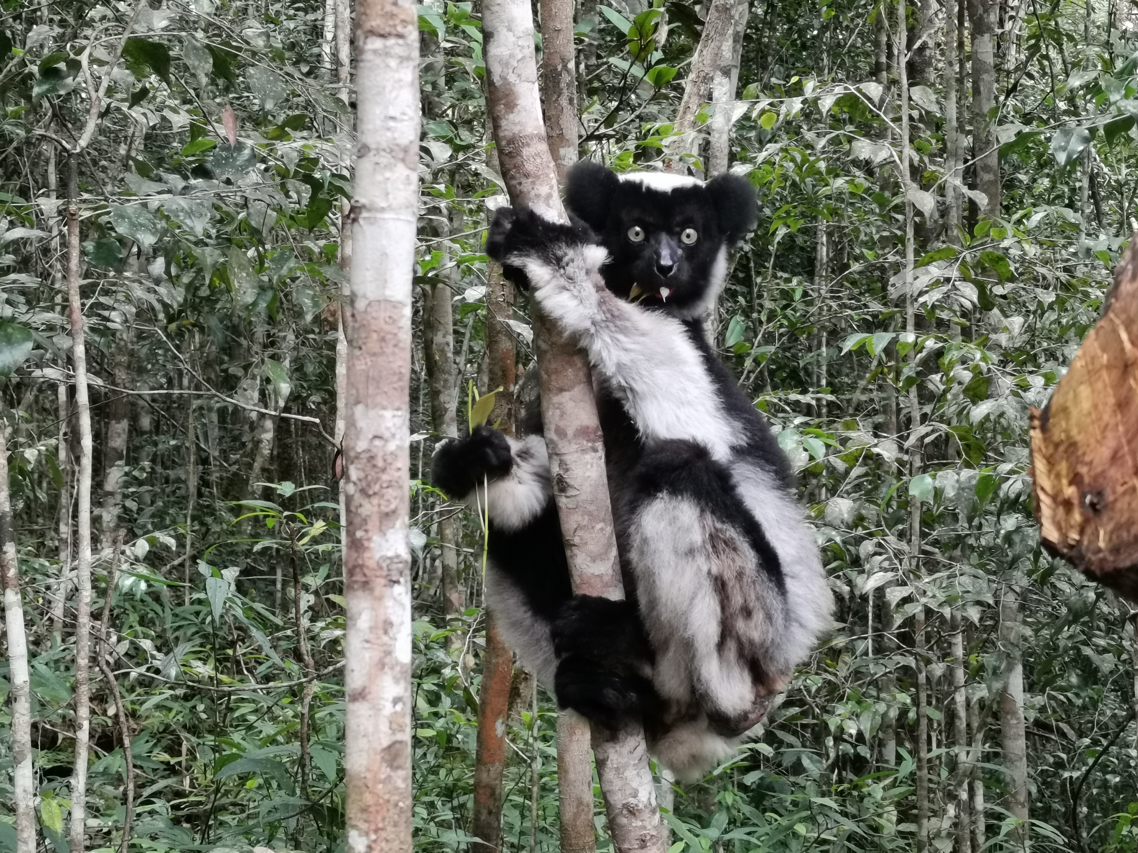 Indri im Andasibe-Mantadia-Nationalpark